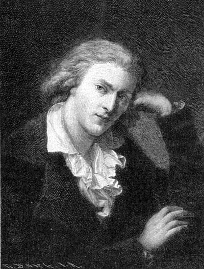 Original caption: Friedrich Schiller Gemalt von A. Graff, Frühjahr 1786, vollendet 1791